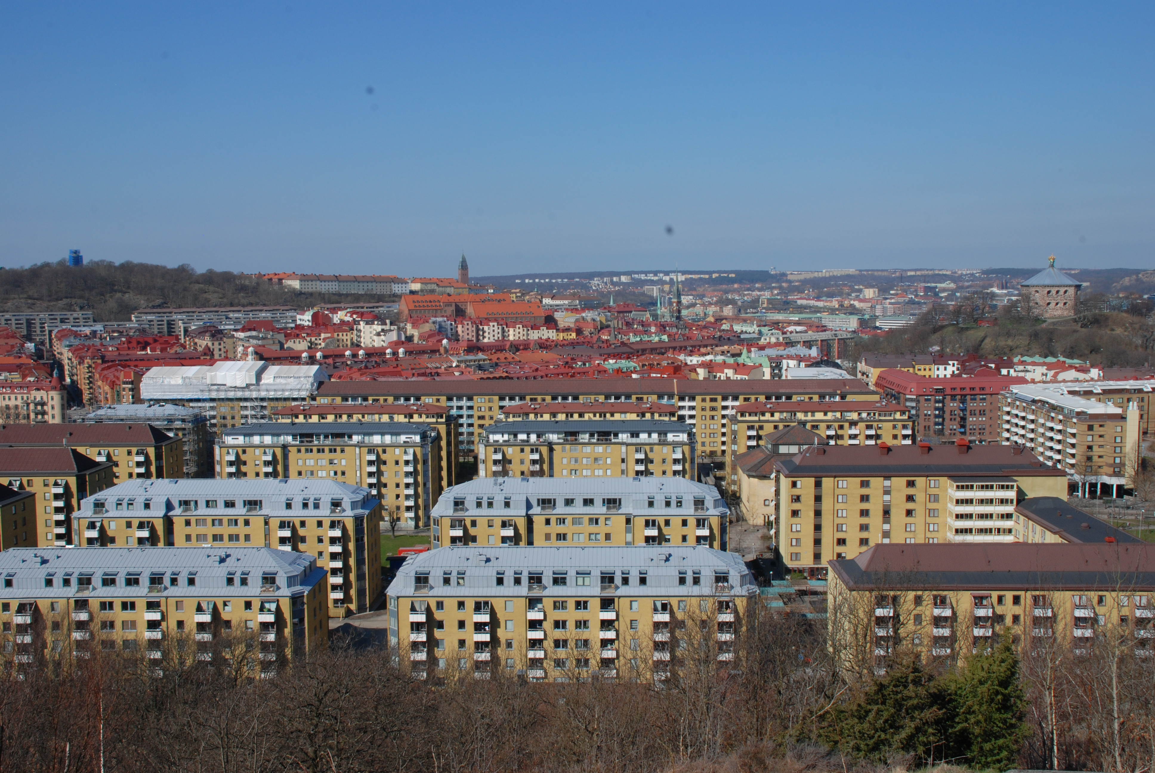 Stadsdelen Annedal i Göteborg sedd från Norra Guldheden.